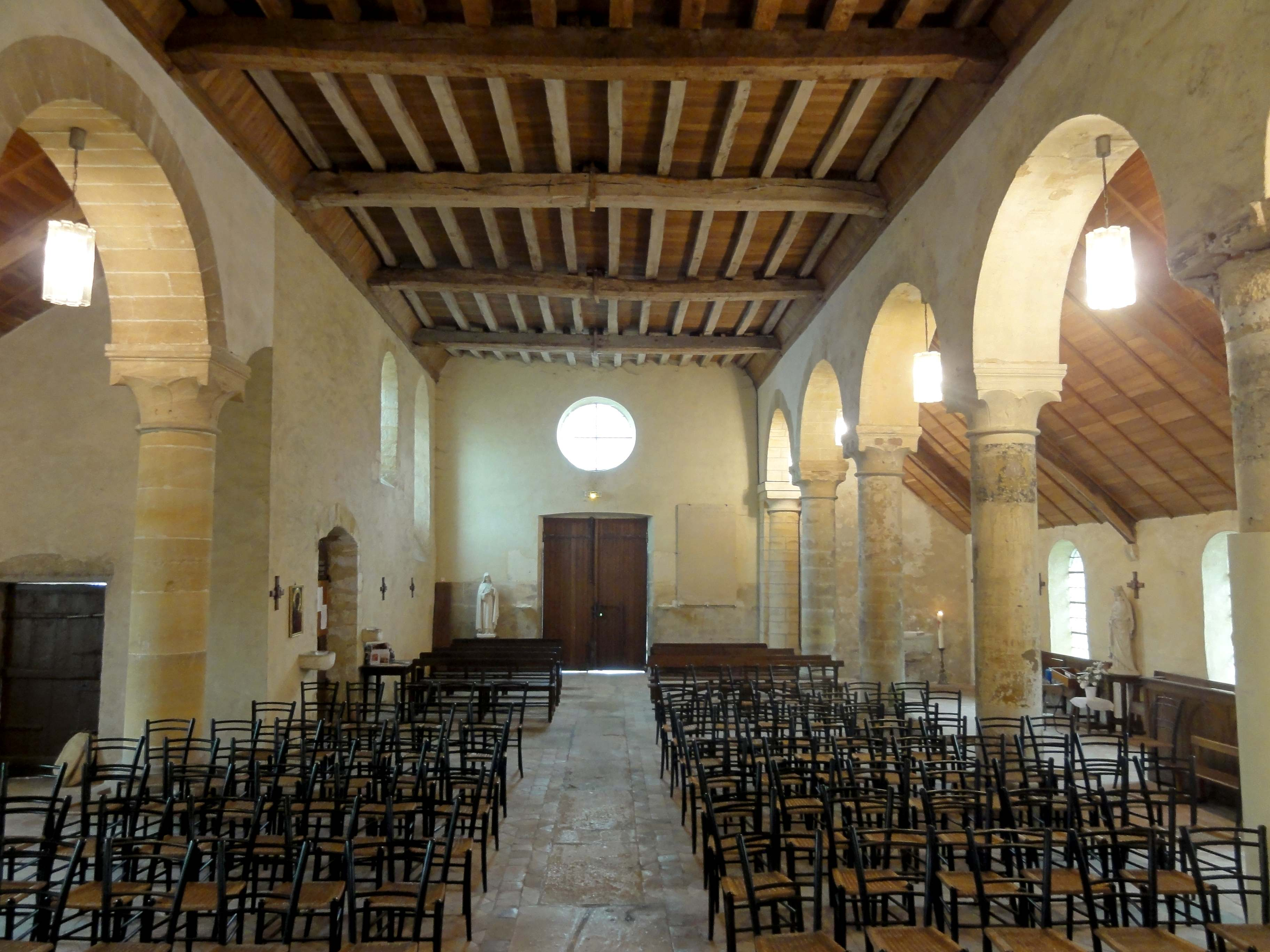 Intérieur de l'église - voir titre.